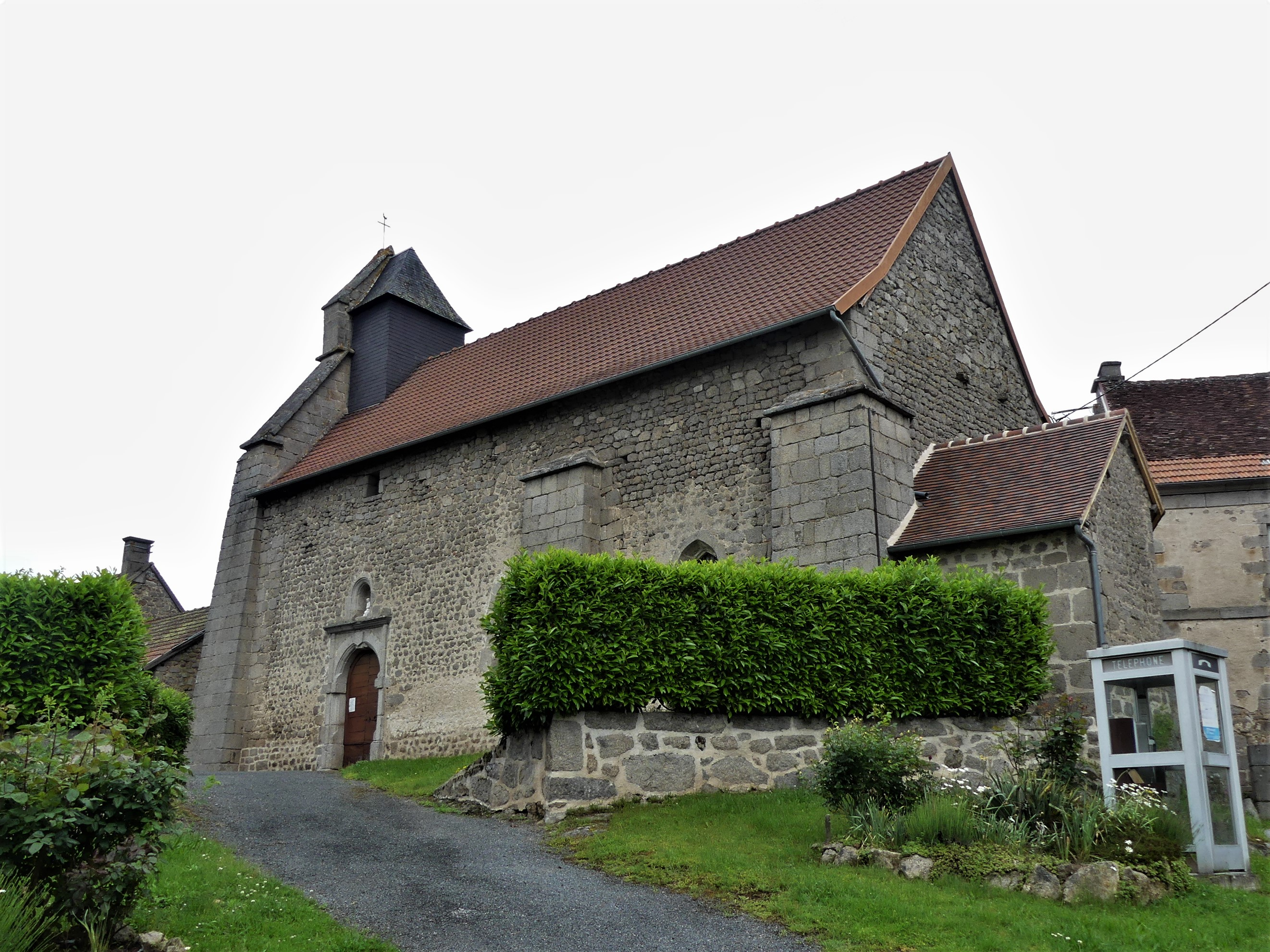 L'église Saint-Amand de Saint-Amand, Creuse, France.